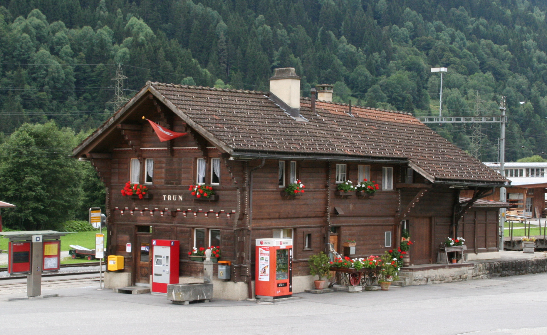 Trun GR Bahnhof